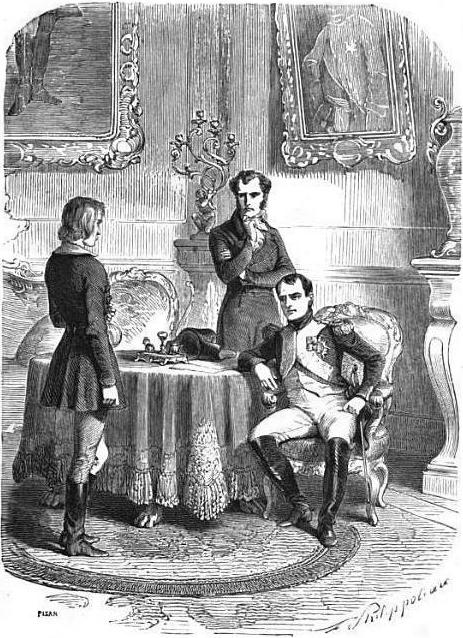 Interrogatoire de Staps.